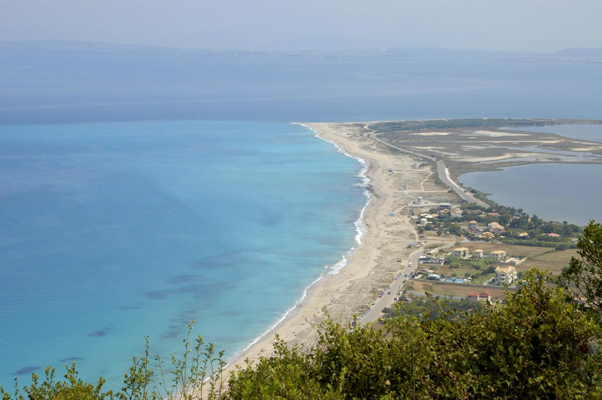 Lefkada/Lefkas, Agios Ioannis